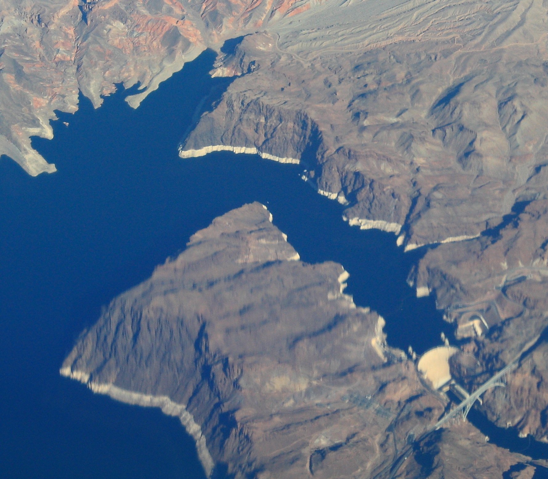 Hoover Dam